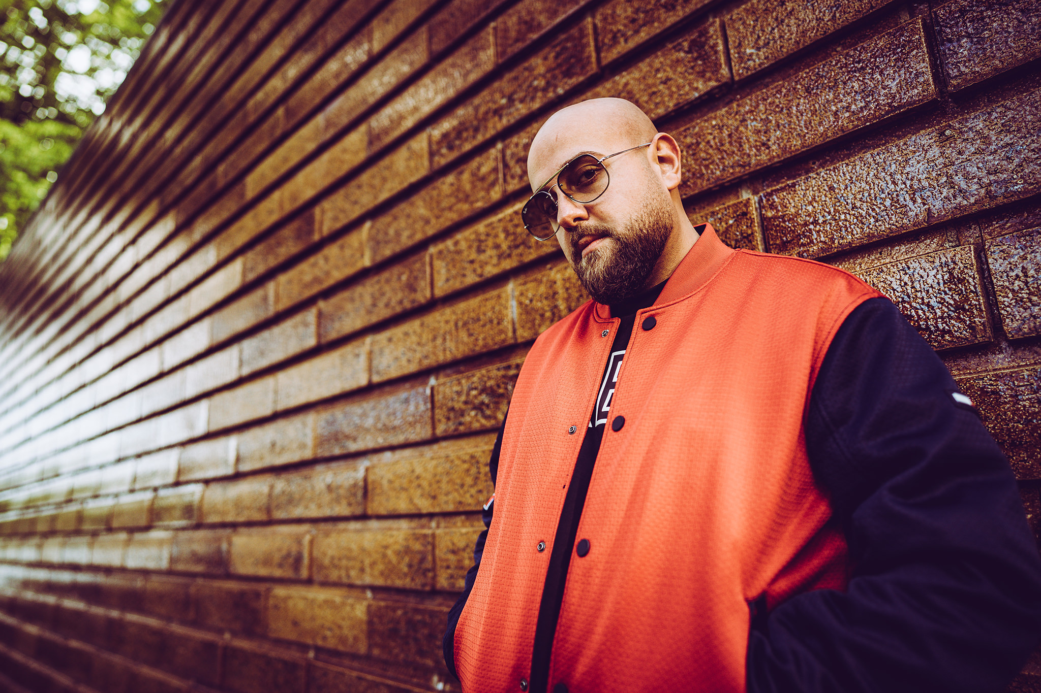 Pressefoto des Rappers EZY